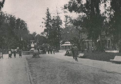 Foto antigua del Paseo del Bosque, en tiempos de esplendor.